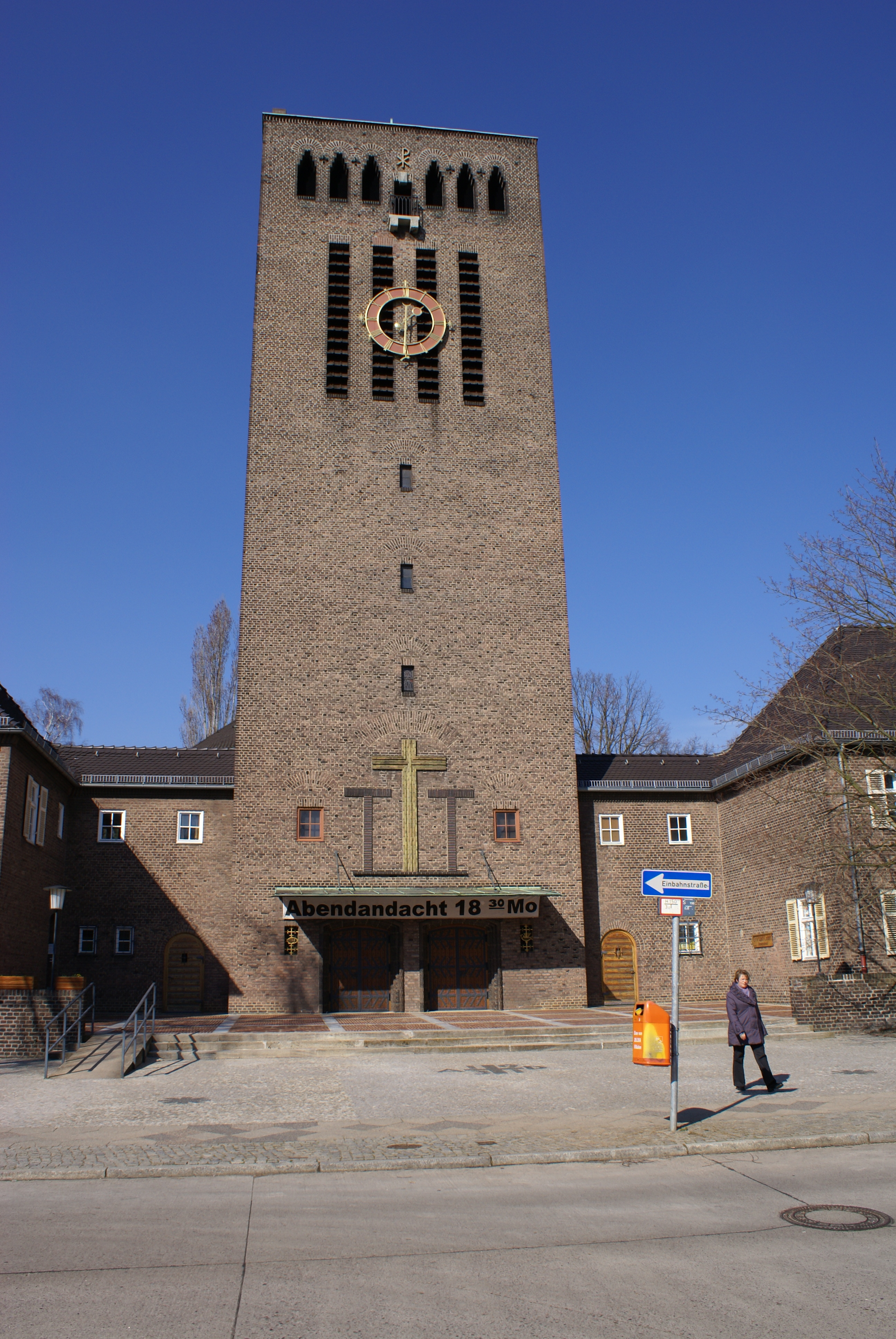 Christophorus-Kirche Berlin-Siemensstadt